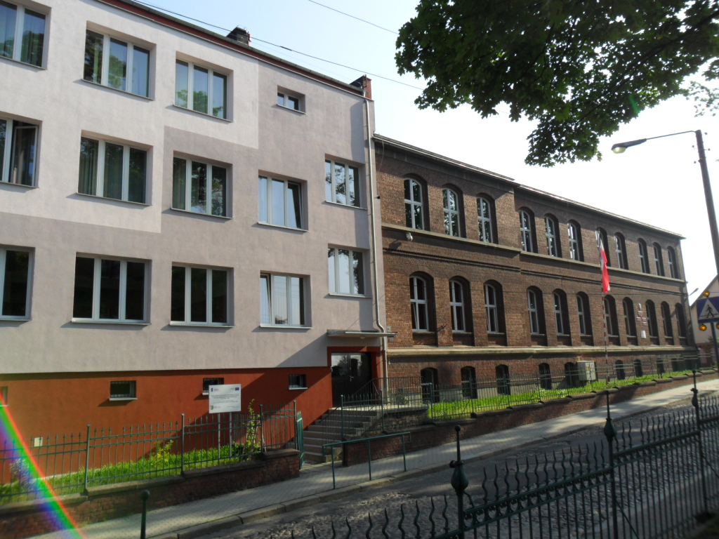 Gubin, ul. Racławicka 1 - dom, Zespół Szkół Licealnych i Technicznych im. Stanisława Staszica, pocz. XX wieku